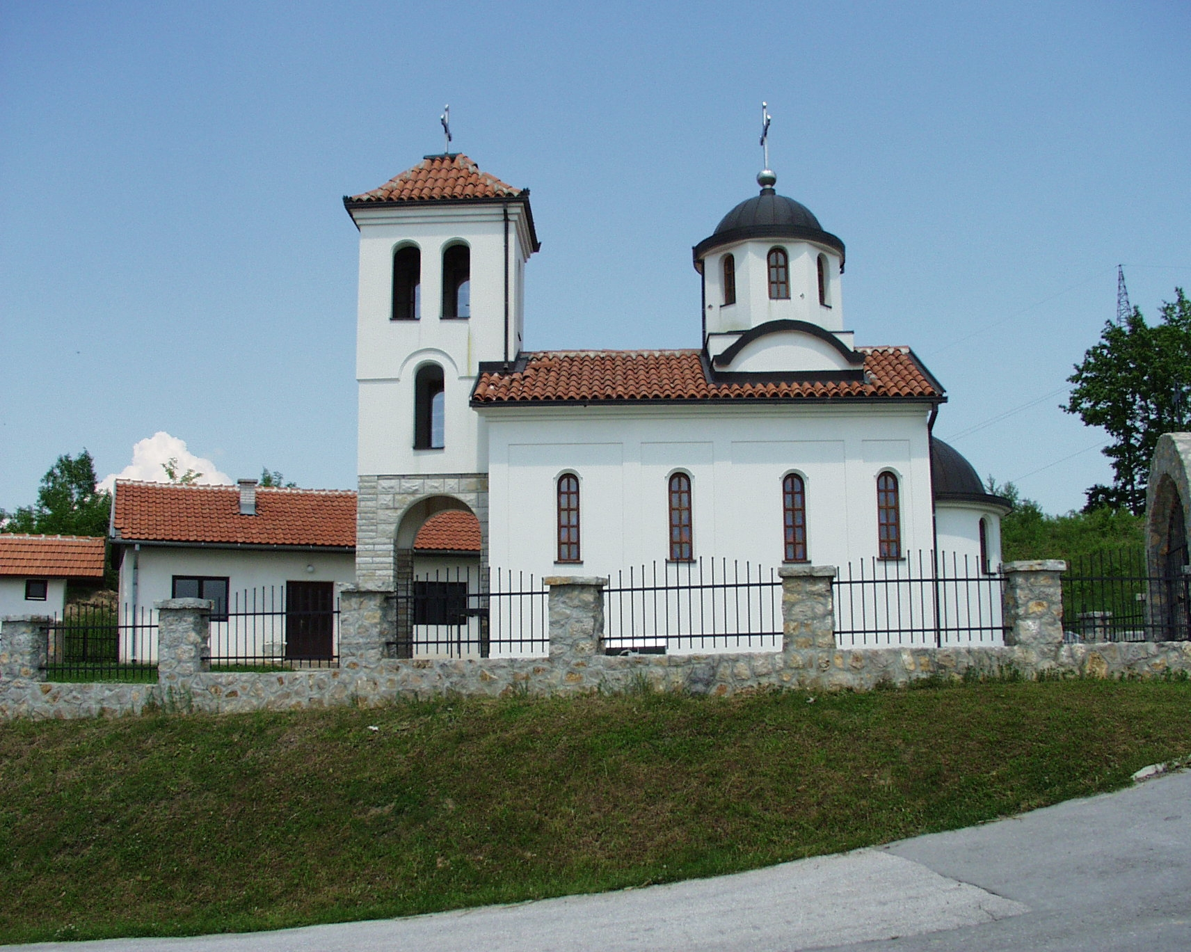 Crkva Sv. velikomučenika Georgija u Radaljevu